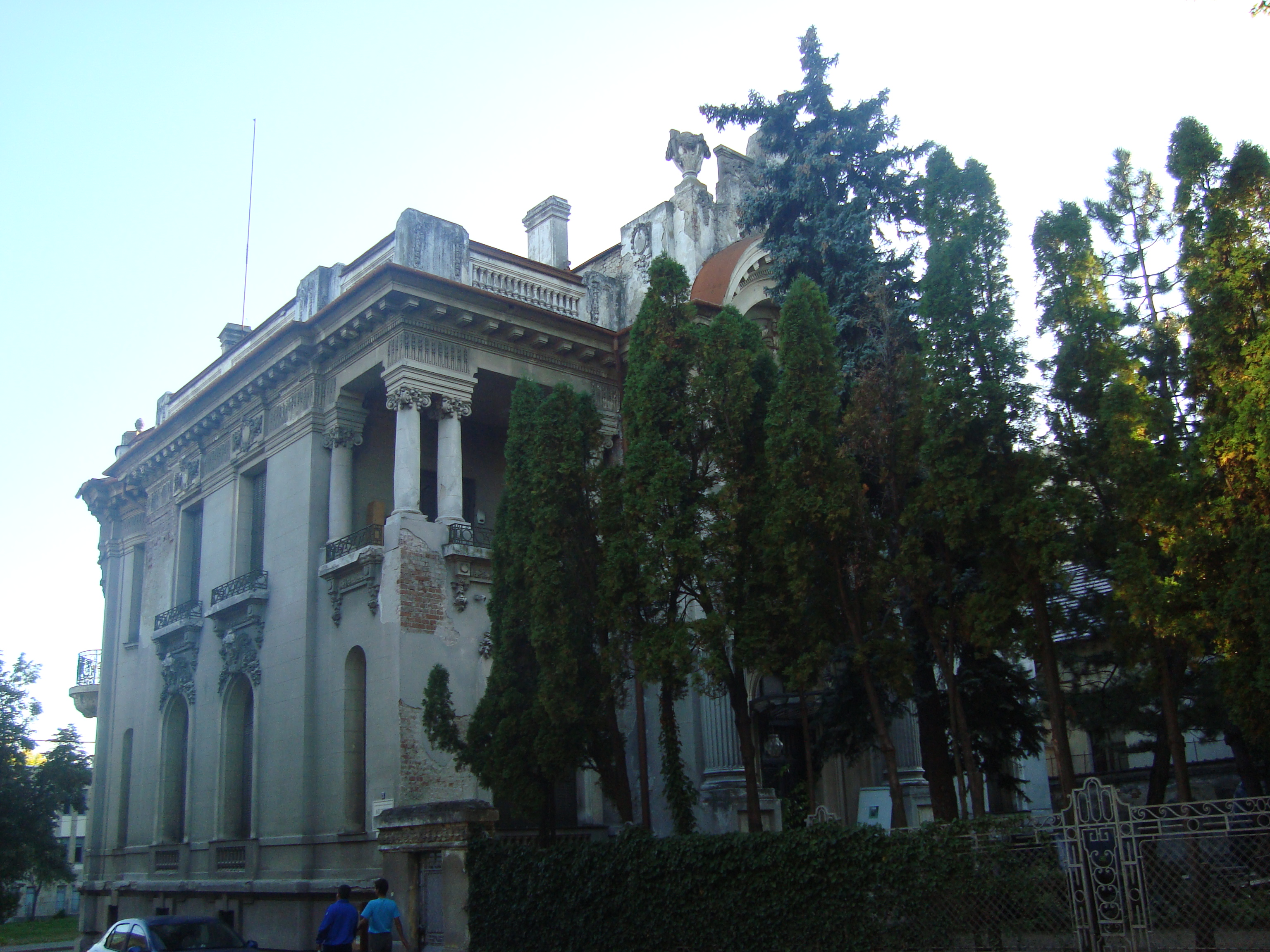 Str. Rahovei 3, vizavi de Facultatea de Geografie